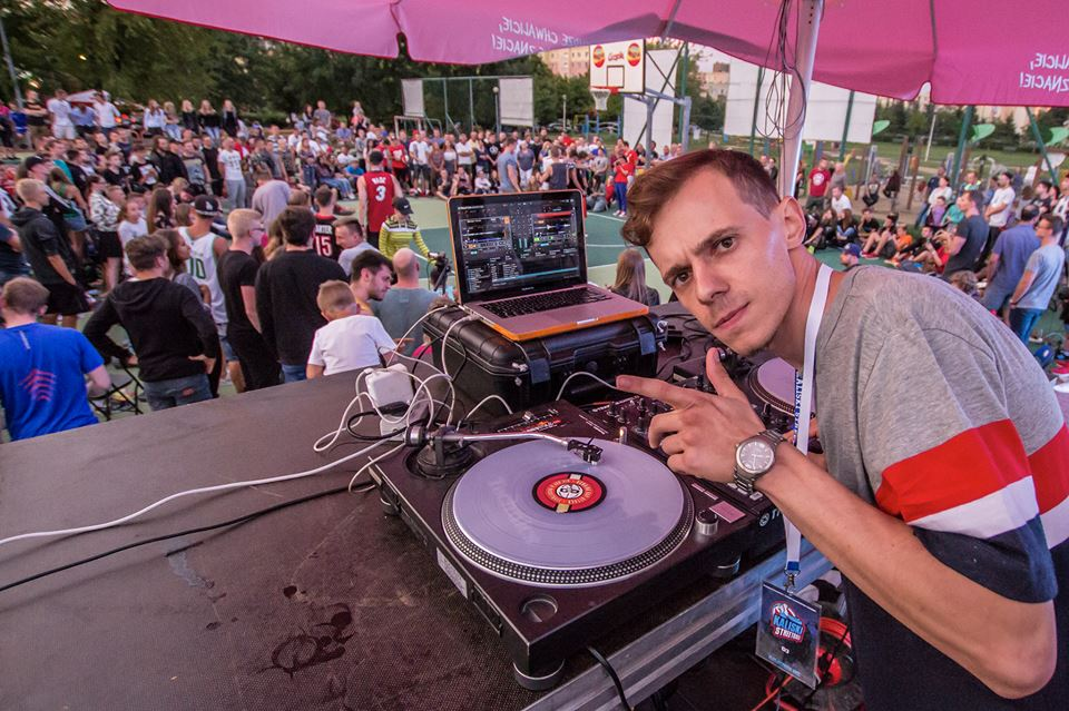 Kaliski Streetball (2018)